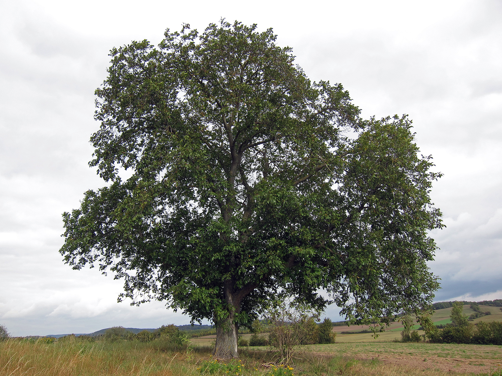 Nuss Augsfeld